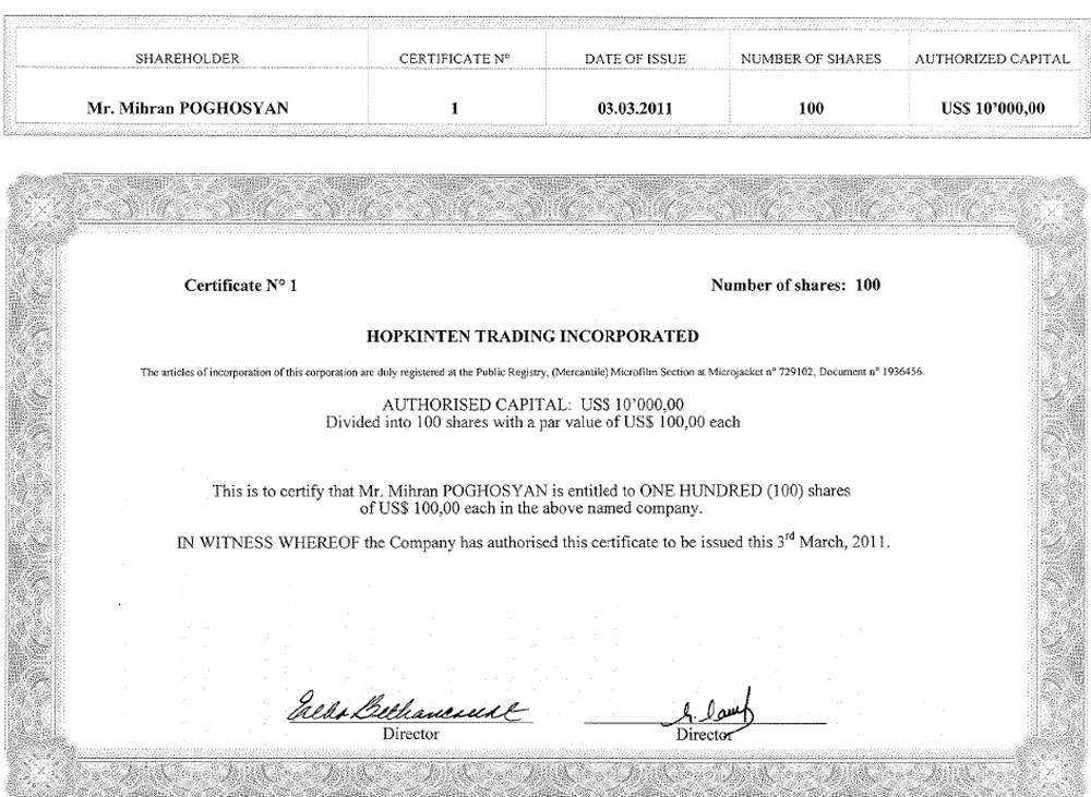 Միհրան Պողոսյանի Hopkinten trading inc.-ի բաժնեմասի տիրապետման սերտիֆիկատ